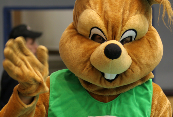 Maskotka BKS Stal Bielsko-Biała